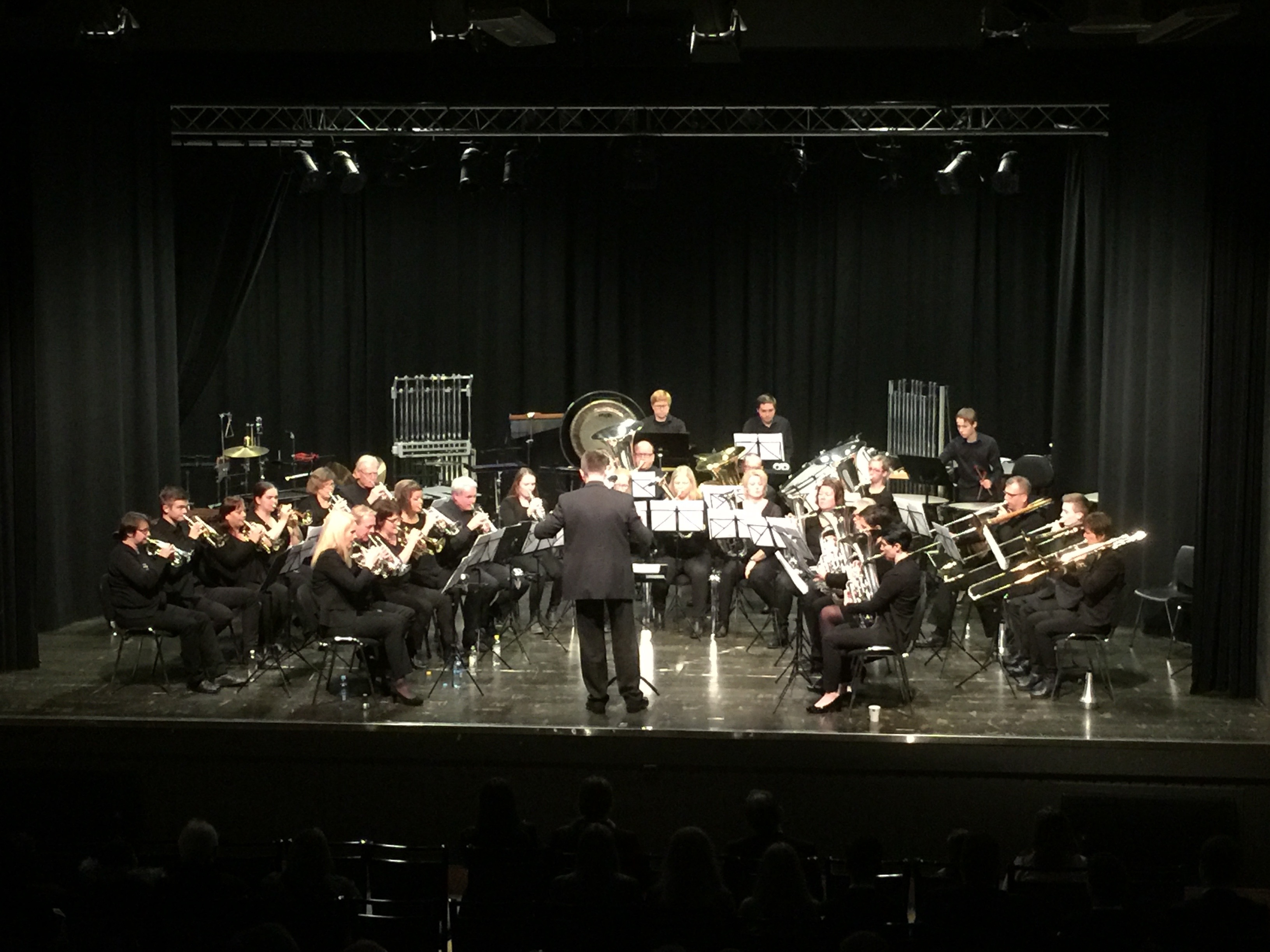 Frei Hornmusikk